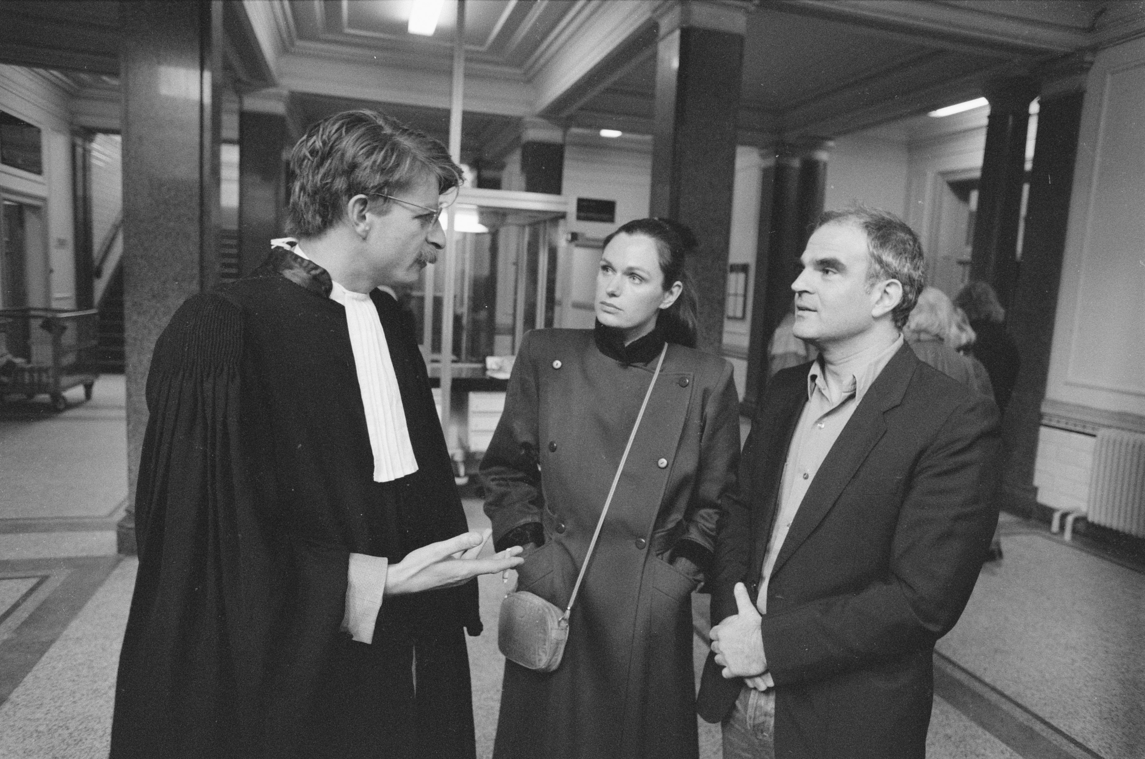 Kort geding van auteur Tim Krabbé en actrice Liz Snoijink tegen het blad Privé; Tim Krabbé en Liz Snoijink met advocaat Germ Kemper (=Lex Dura)